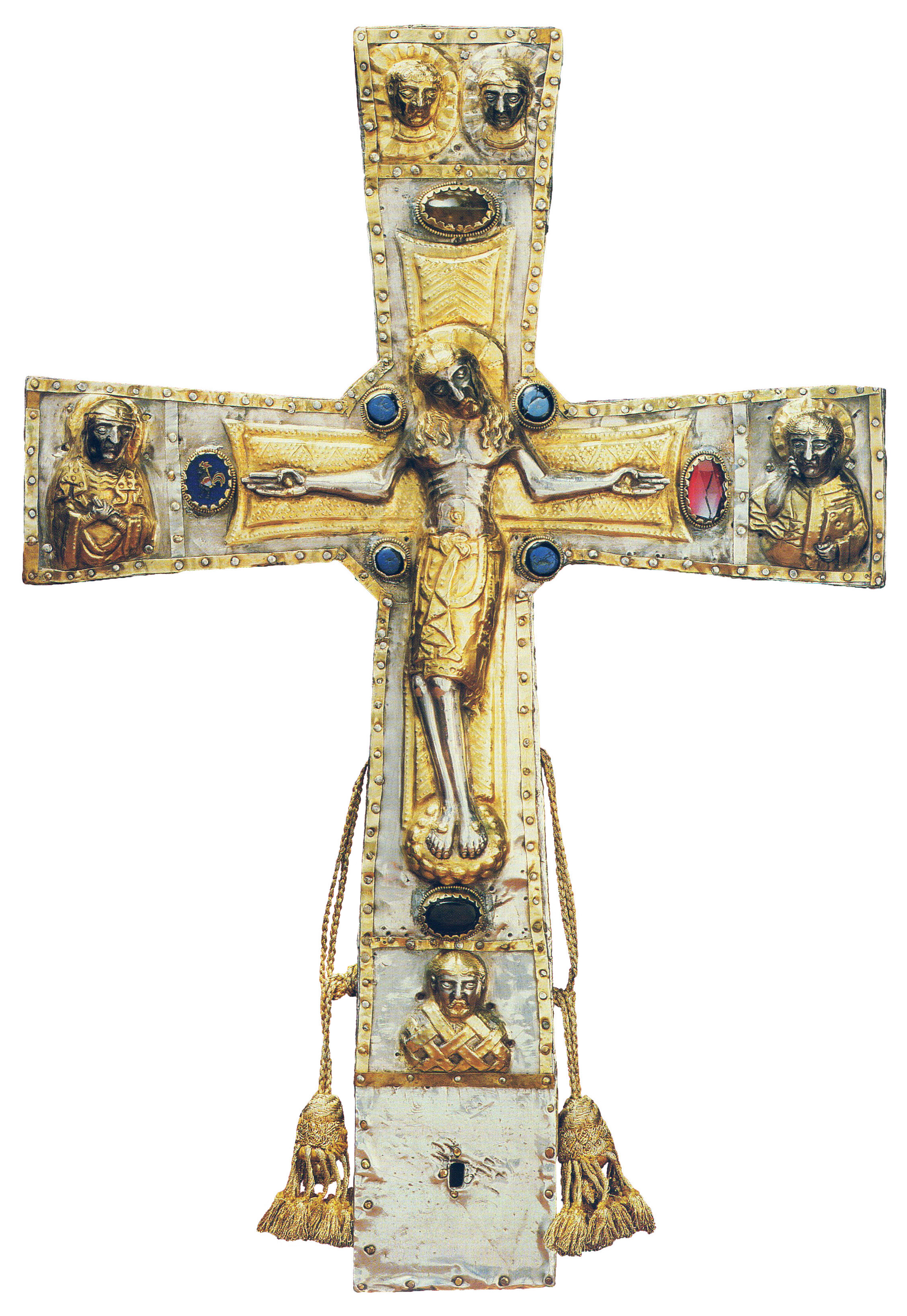 croce del campo1.jpg